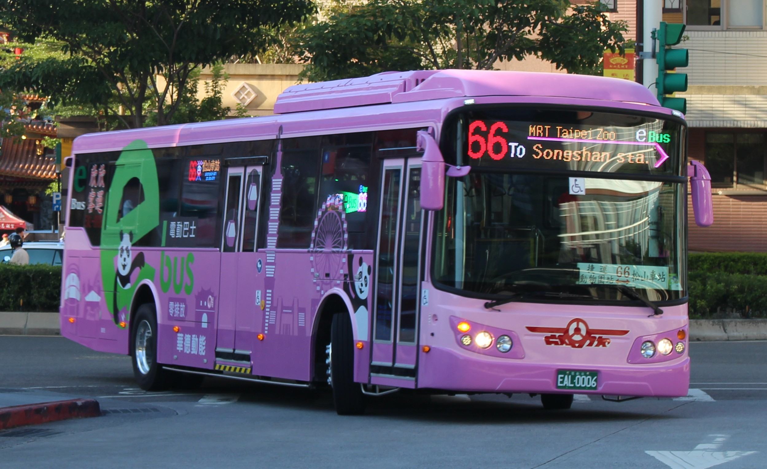 欣欣客運2018 RAC RACE150 EAL-0006 66